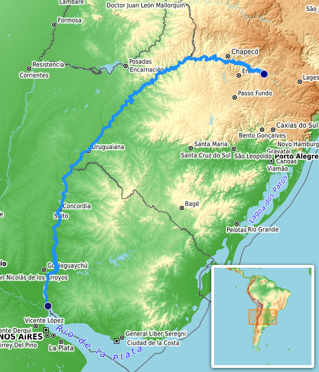 carte réalisée sur umap.openstreetmap This map may be incomplete, and may contain errors. Don't rely solely on it for navigation.